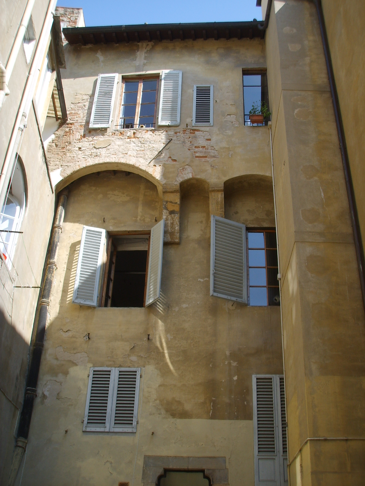 Palazzo pesciolini venerosi retro